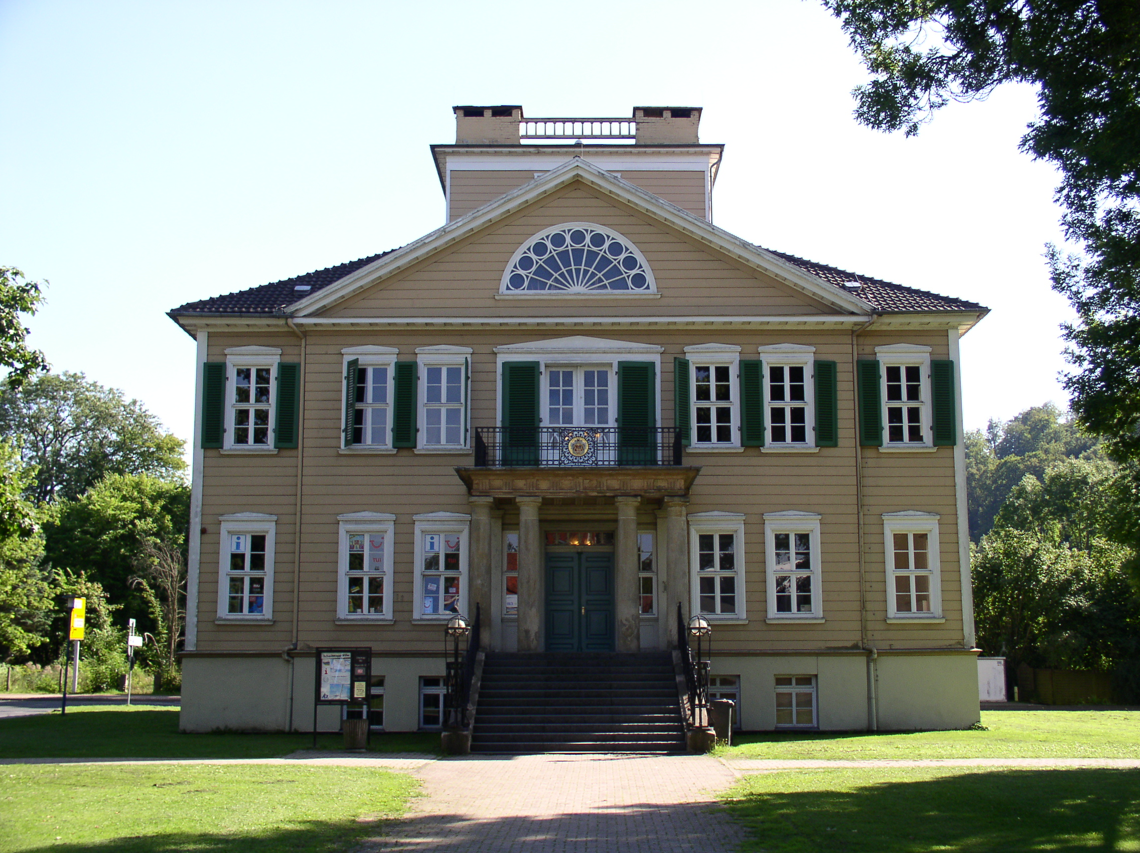 Klassizistische Villa des Fabrikanten Johann Friedrich Schachtrupp, erbaut 1819